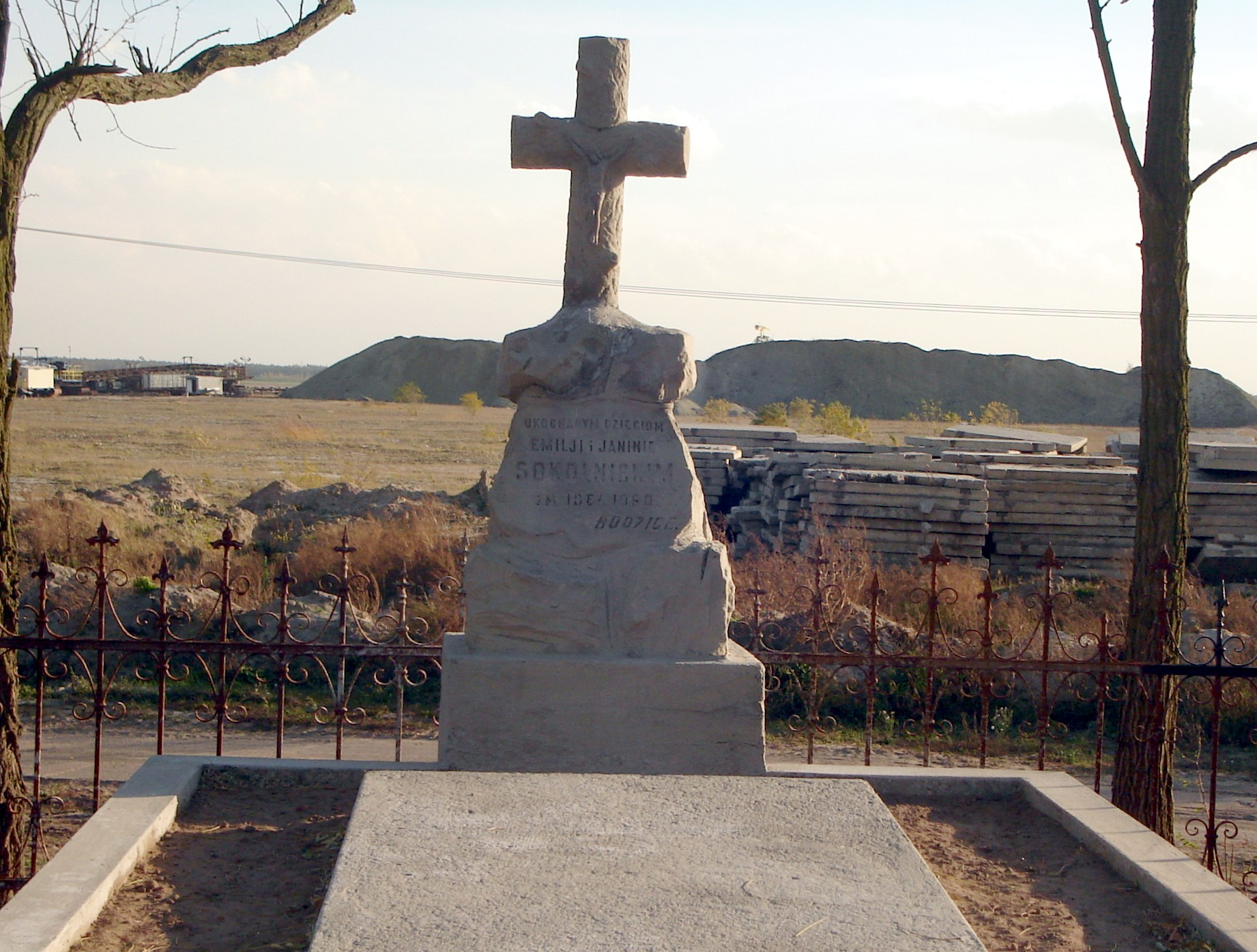 Hrob na hřbitově v Janiszewě, Velkopolské vojvodství, Polsko